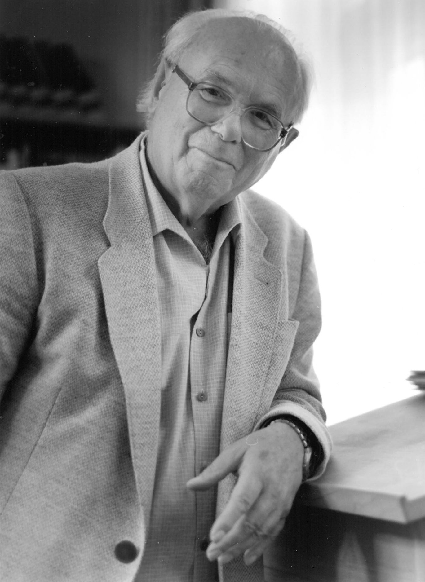 Kay Hoff bei einem Vortrag um 2006, Ausschnitt einer digitalisierten Photographie aus dem Privatarchiv von Kay Hoff